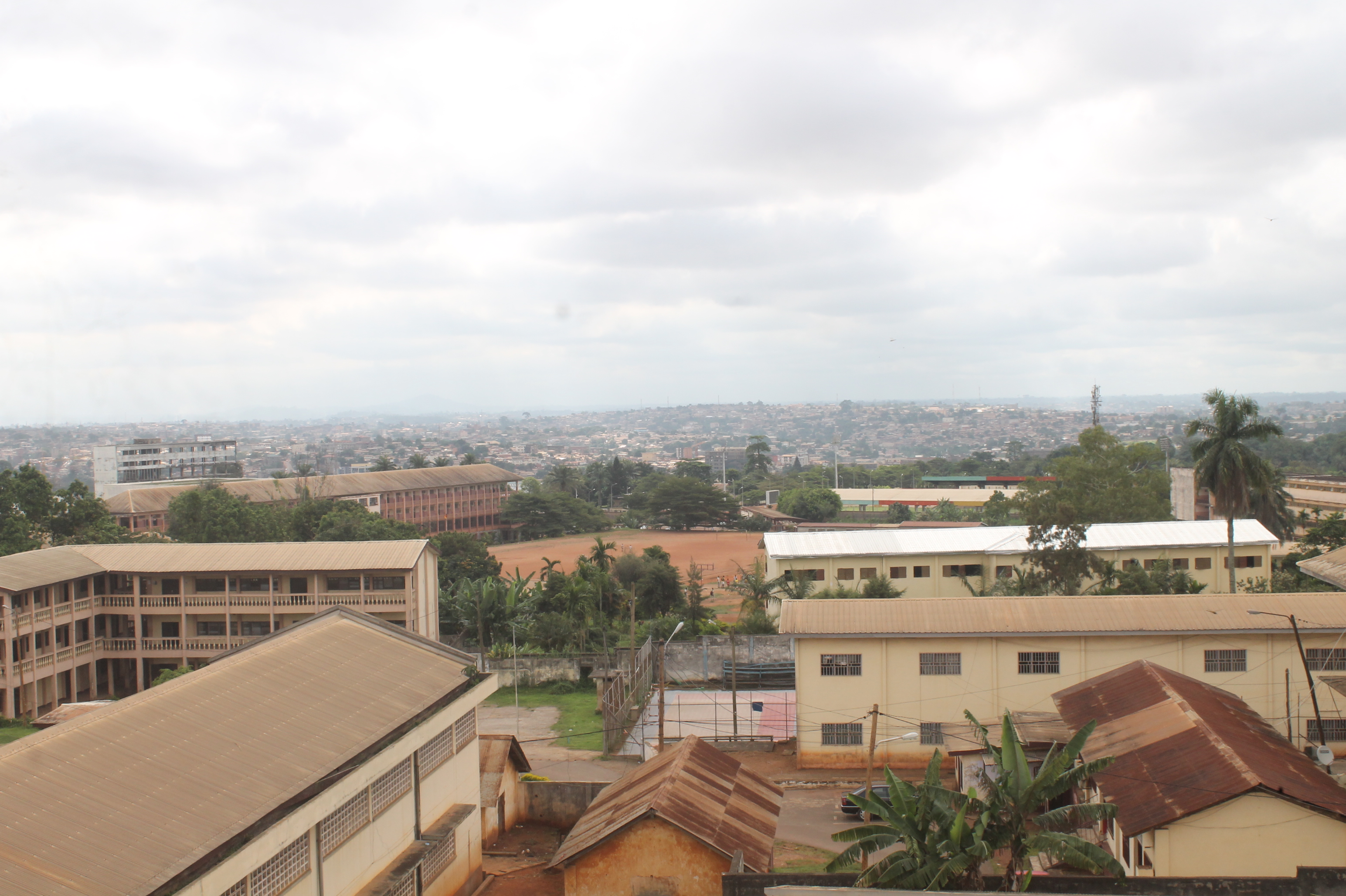 Vue panoramique de quelques établissements de Ngoa Ekelle: Ecole primaire, INJS, Lycée Leclerc